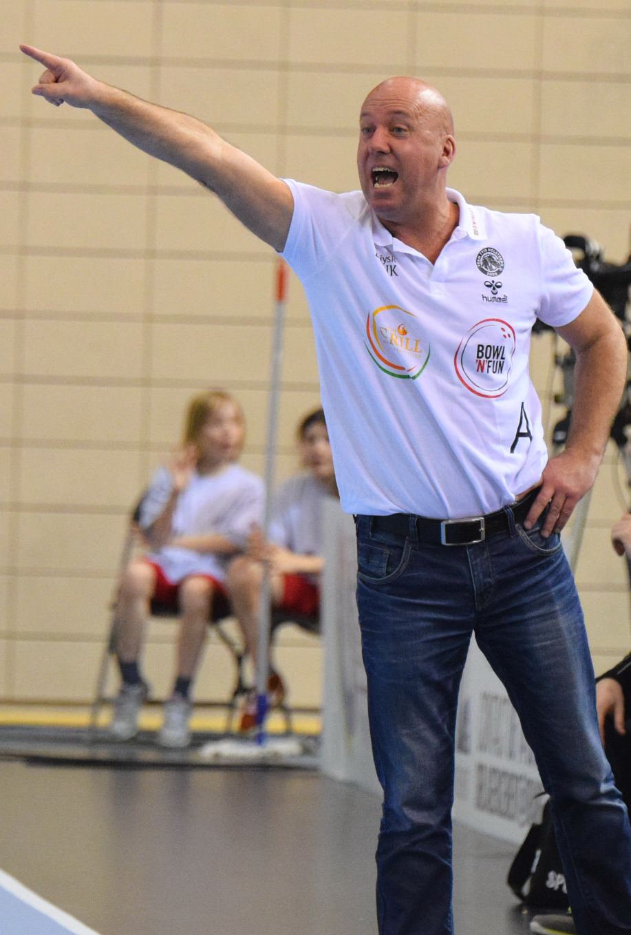 Nils Pether Krautmeyer Le 03 avril 2016 lors du match aller de demi-finale de la Coupe des vainqueurs de coupe de handball Issy Paris Hand / Team Tvis Holstebro